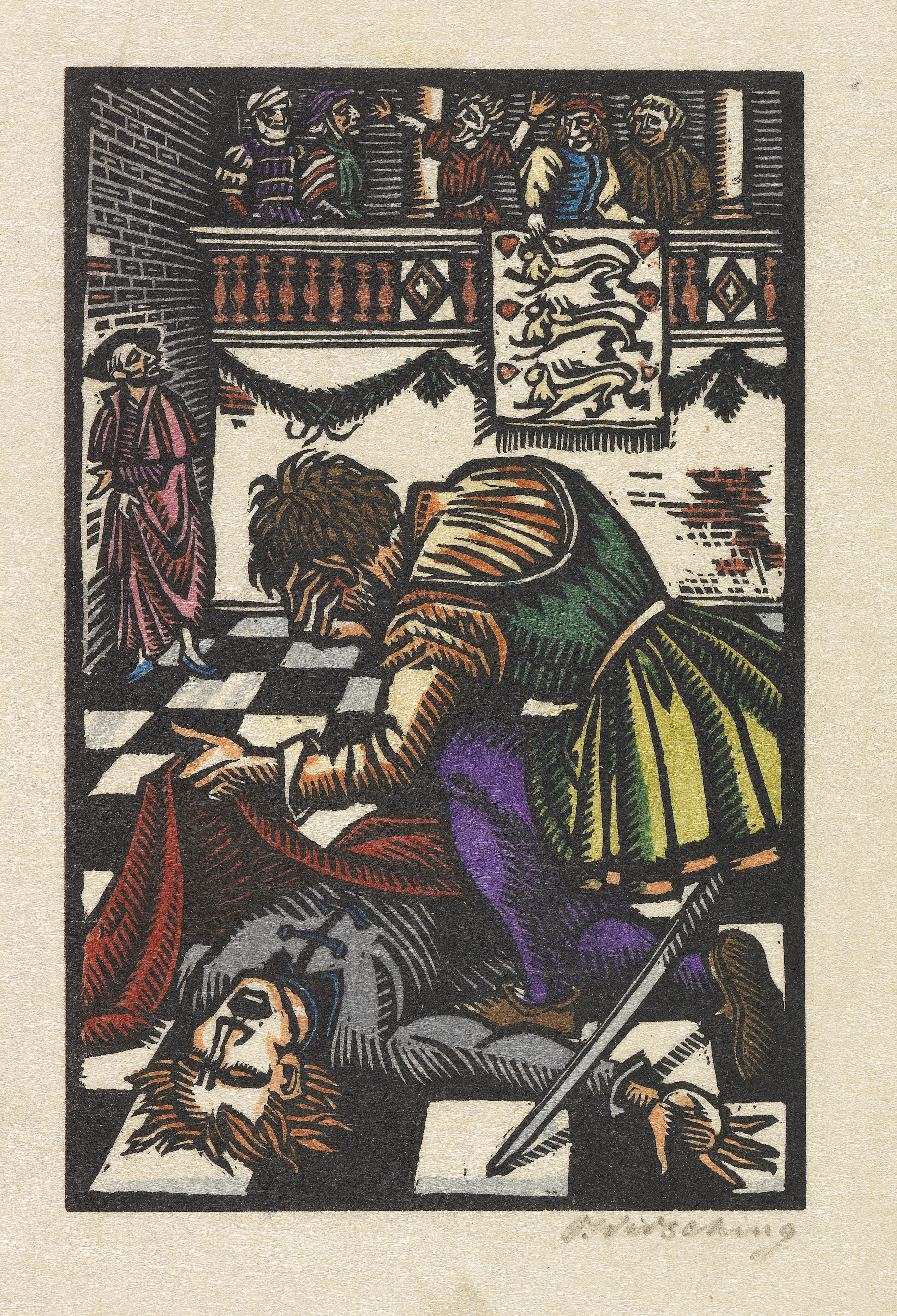 einer von 12 Holzschnitten von Otto Wirsching zu Hamlet. Prinz von Dänemark. Dachau, Einhorn 1918